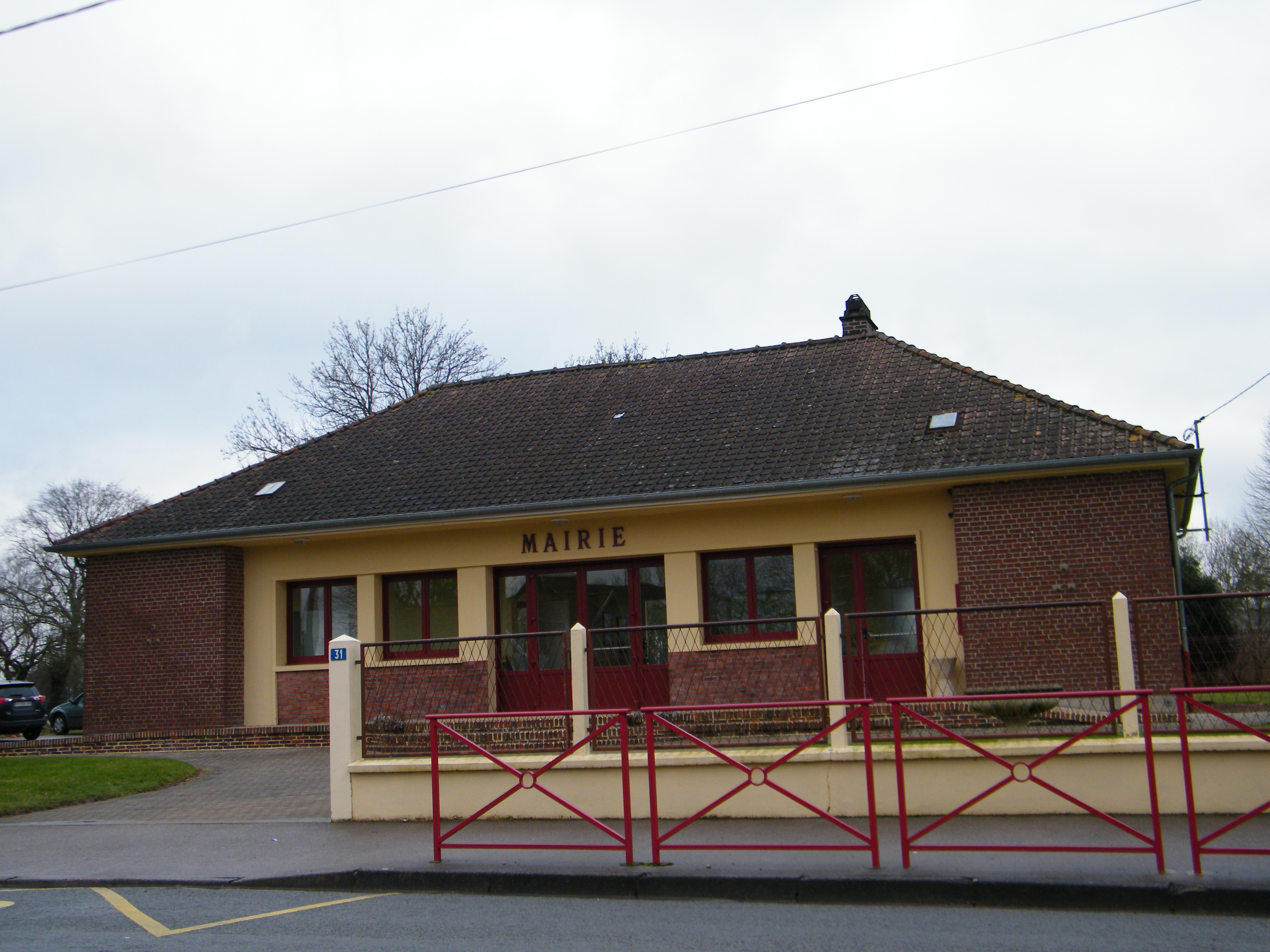 Mairie d'Aigneville, Somme, France.